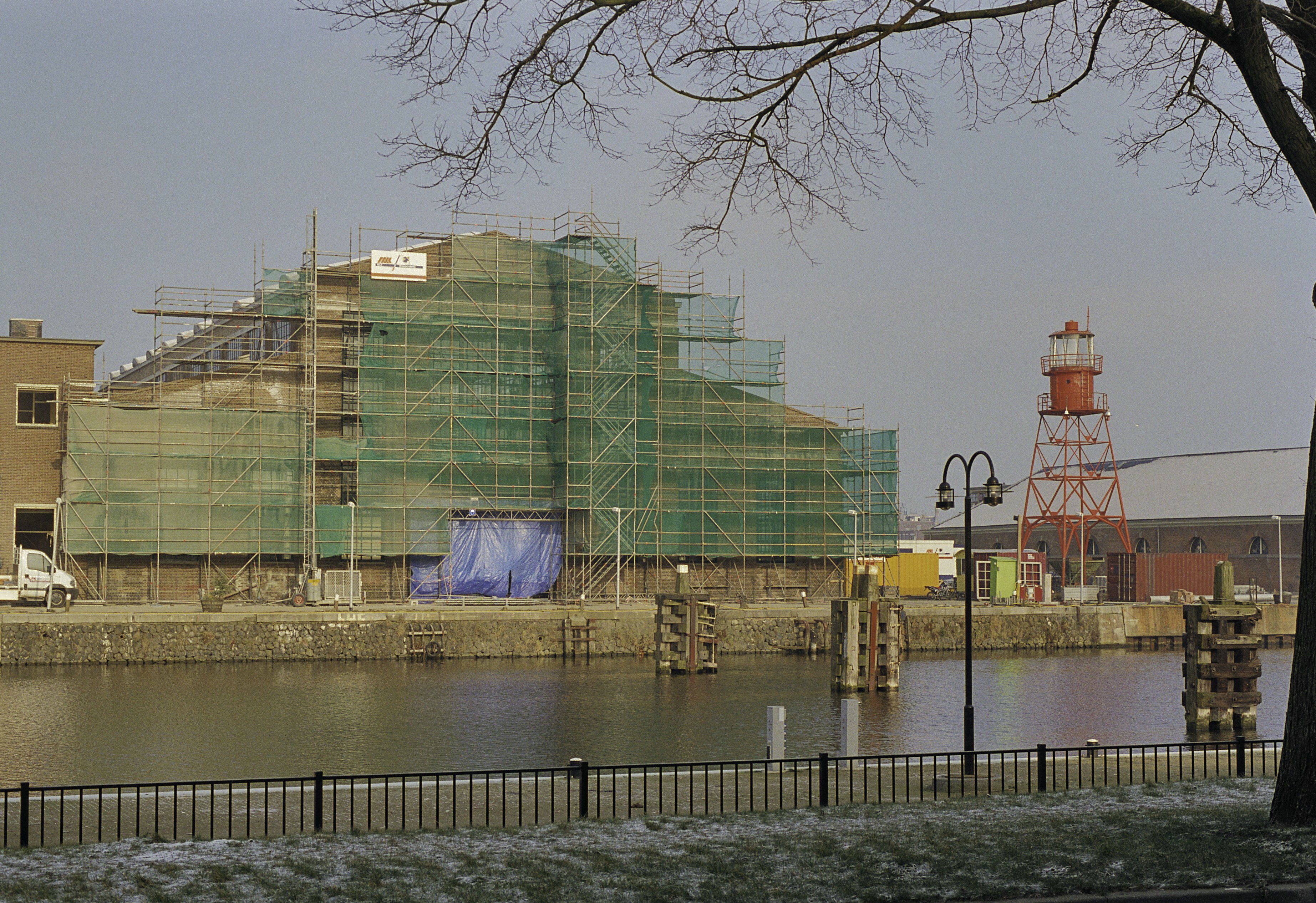 Willemsoord: Vooraanzicht van de scheepswerf tijdens werkzaamheden (opmerking: Kanjers 2001) This is a possible Rijksmonument: Find the monument in the Monuments database: Rijksweg in Den Helder All Rijksmonumenten in Den Helder Is this a Rijksmonument? Yes No More information about this project and help. More images to work at in Category:Possible Rijksmonumenten.